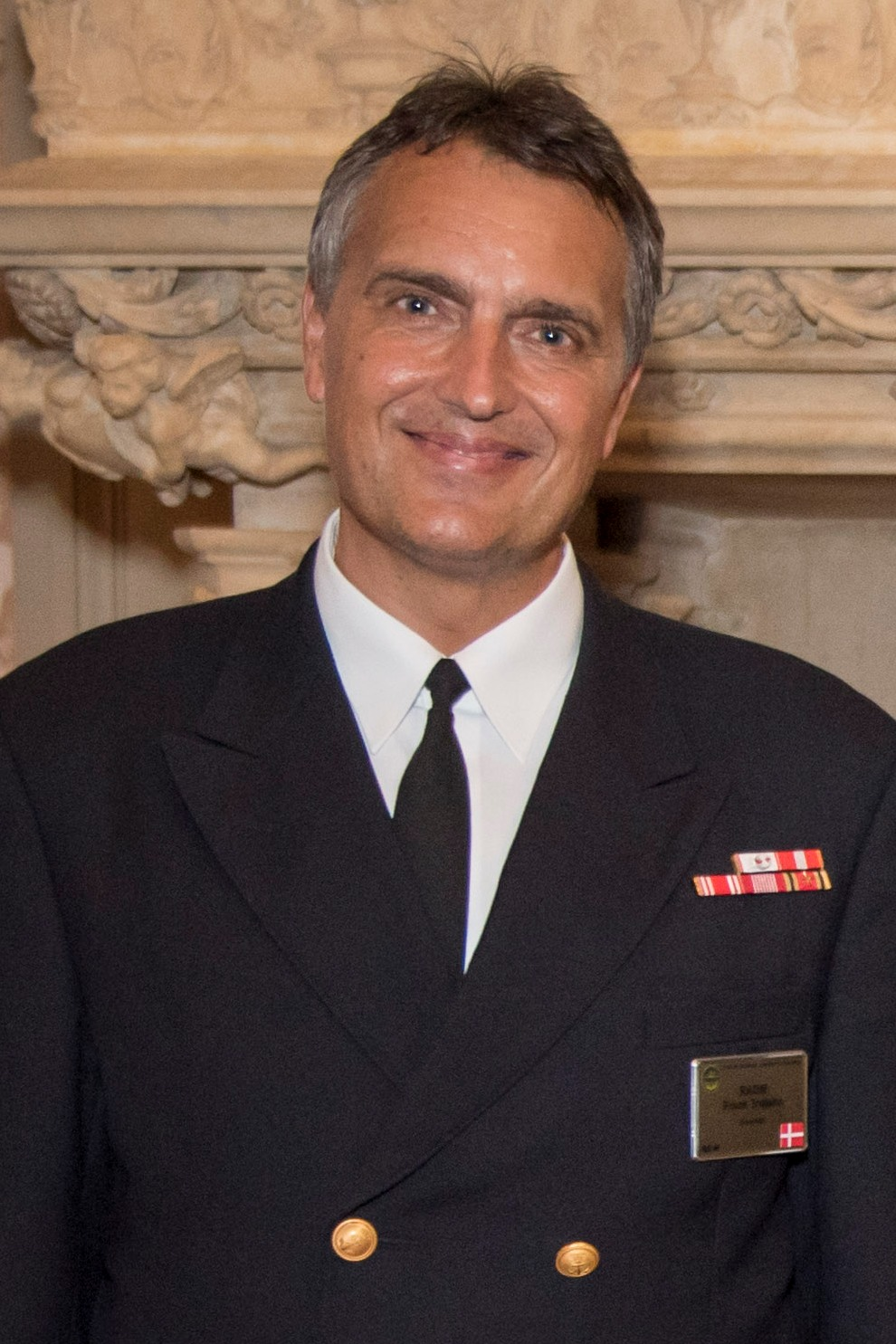 Kontreadmiral Frank Trojahn